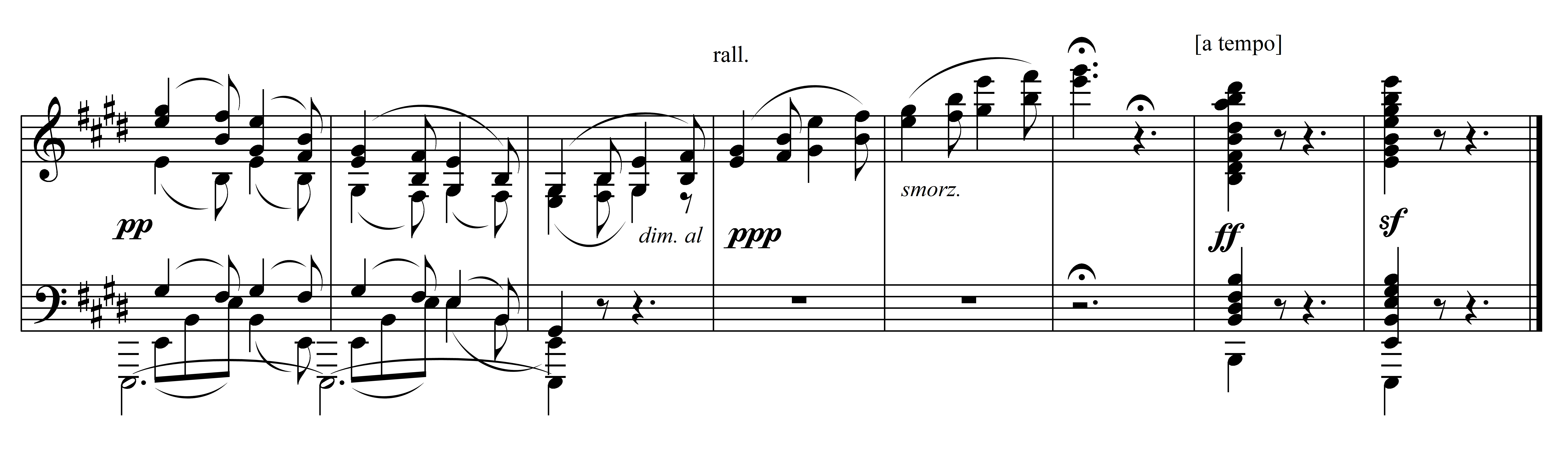 Notenbeispiel Smetana Die Moldau Entschwinden in der Ferne T. 420-427